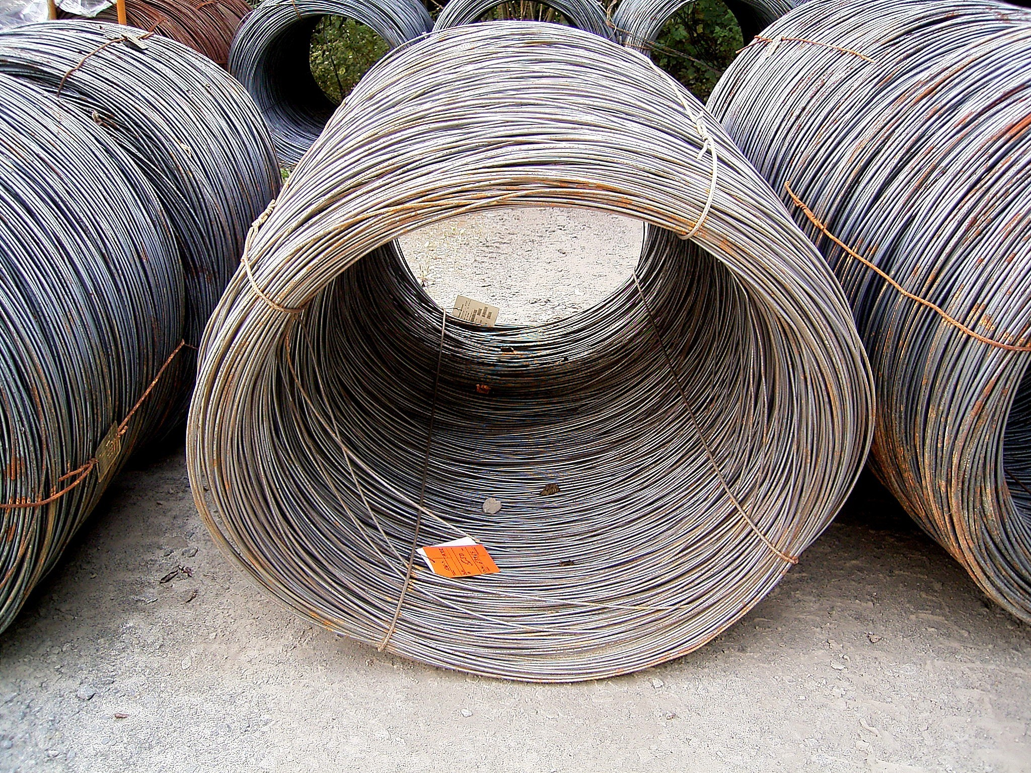 Steel wire